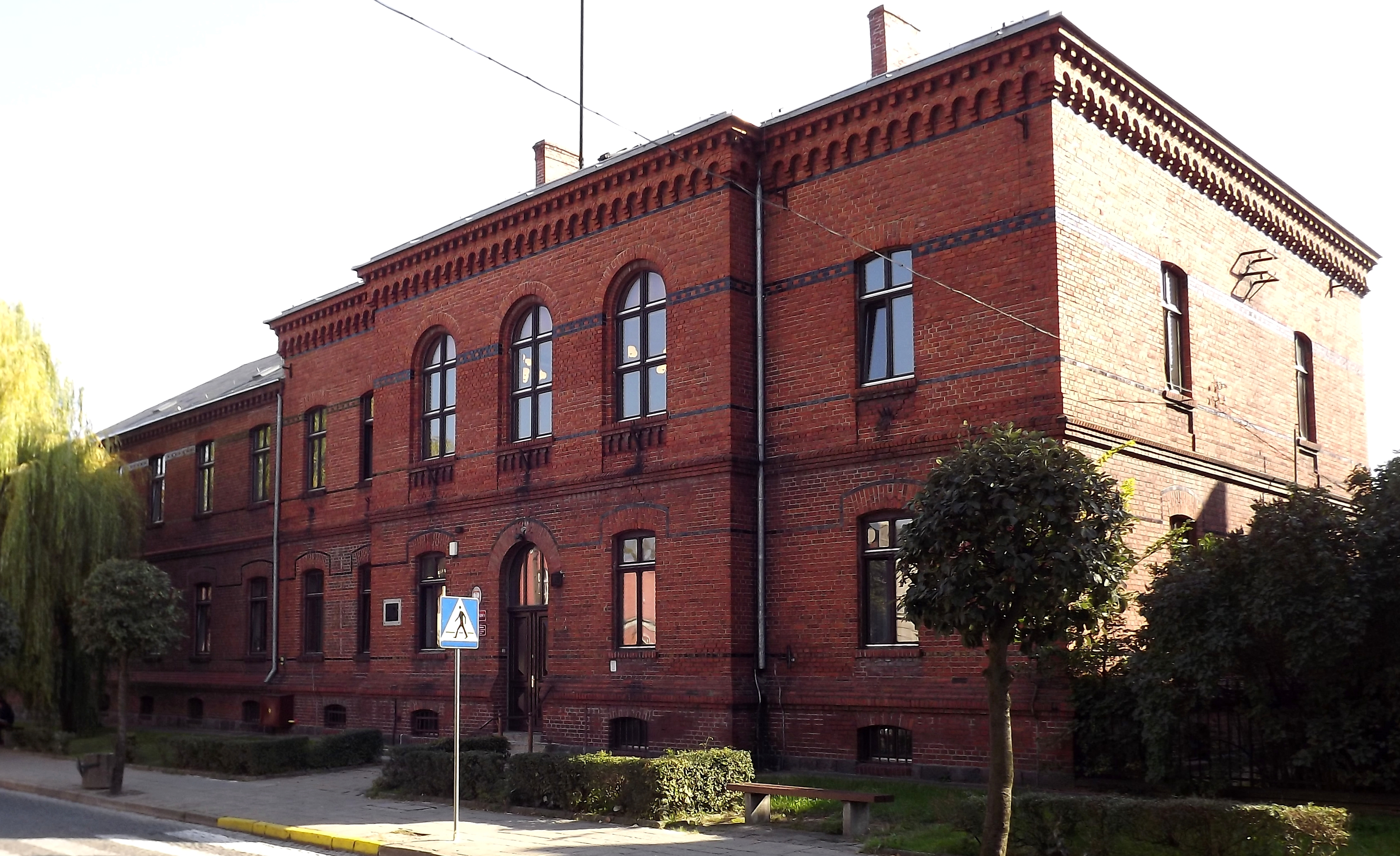 Wąbrzeźno, ul. Wolności 19/21 - sąd grodzki, ob. rejonowy, 1880, 1908-1914; widok od frontu (zabytek nr 621)